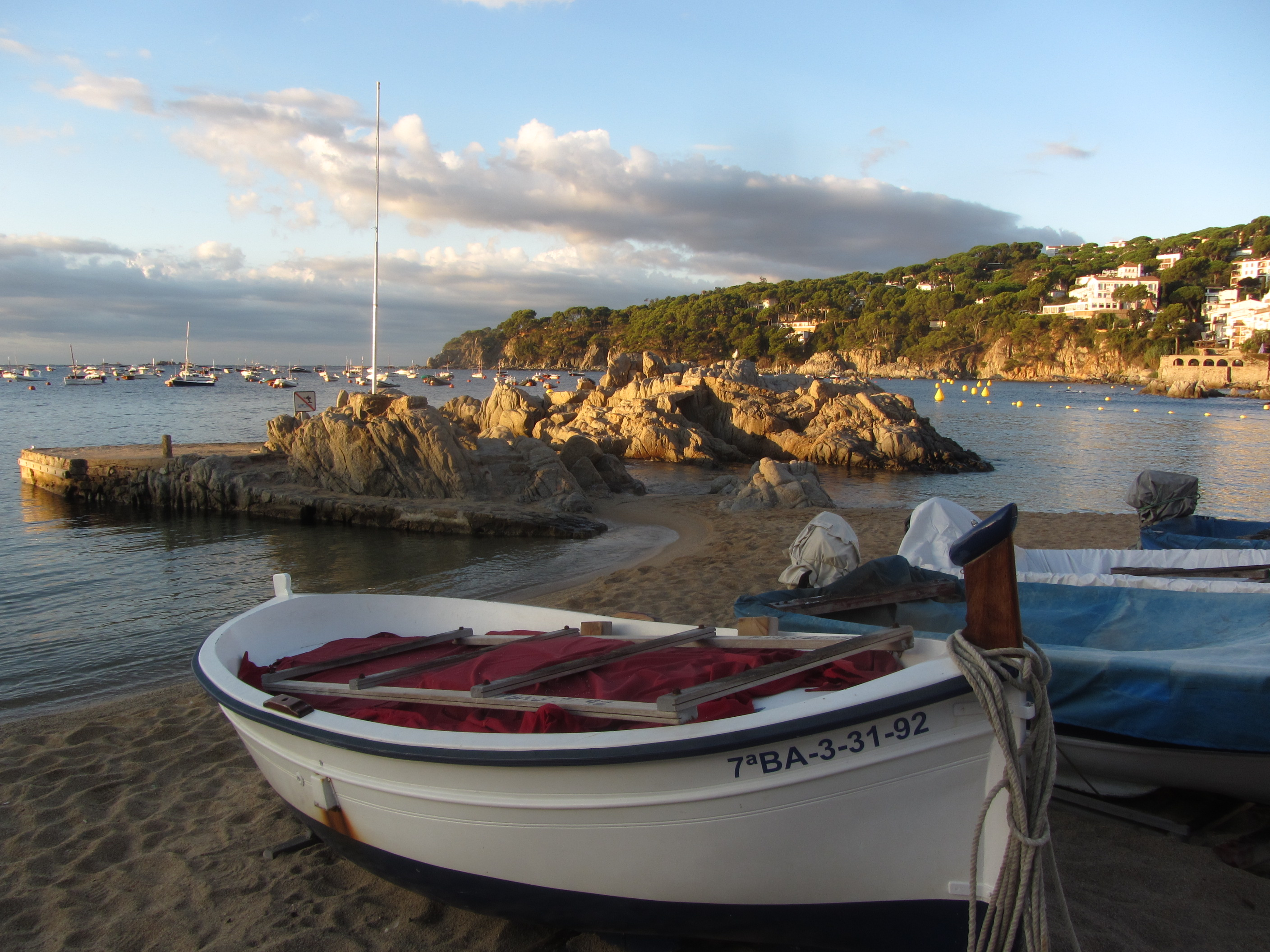 Calella de Palafrugell (Girona)